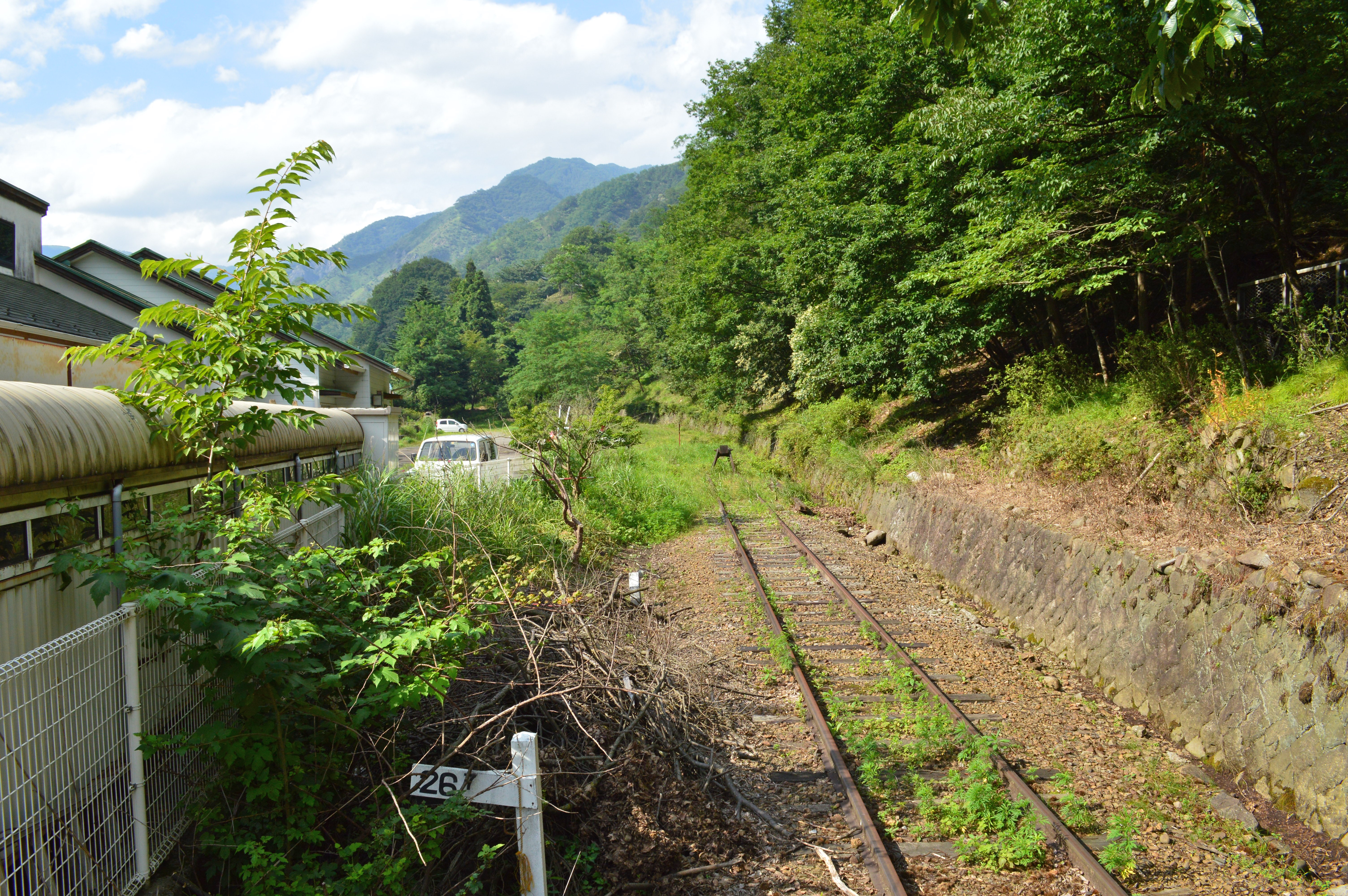 間藤駅 車止め